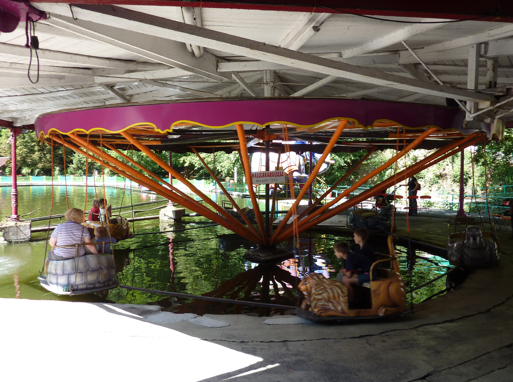 Wasserkarussell Freizeitpark Ittertal, SolingenThis is a photograph of an architectural monument., no. 514